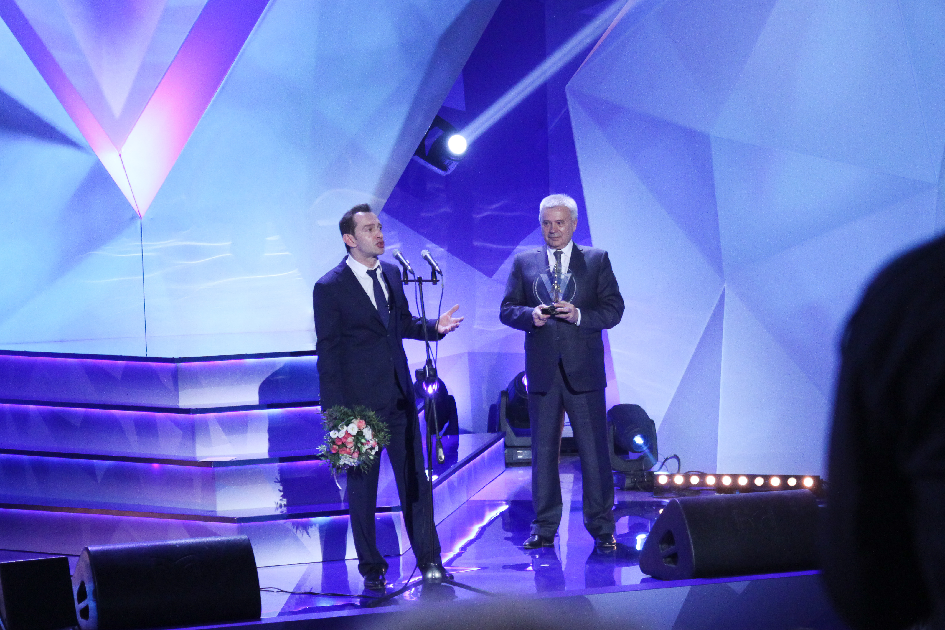 Церемония вручения премии "Импульс добра" в области социального предпринимательства в концертном зале Правительства Москвы, 17 мая 2016